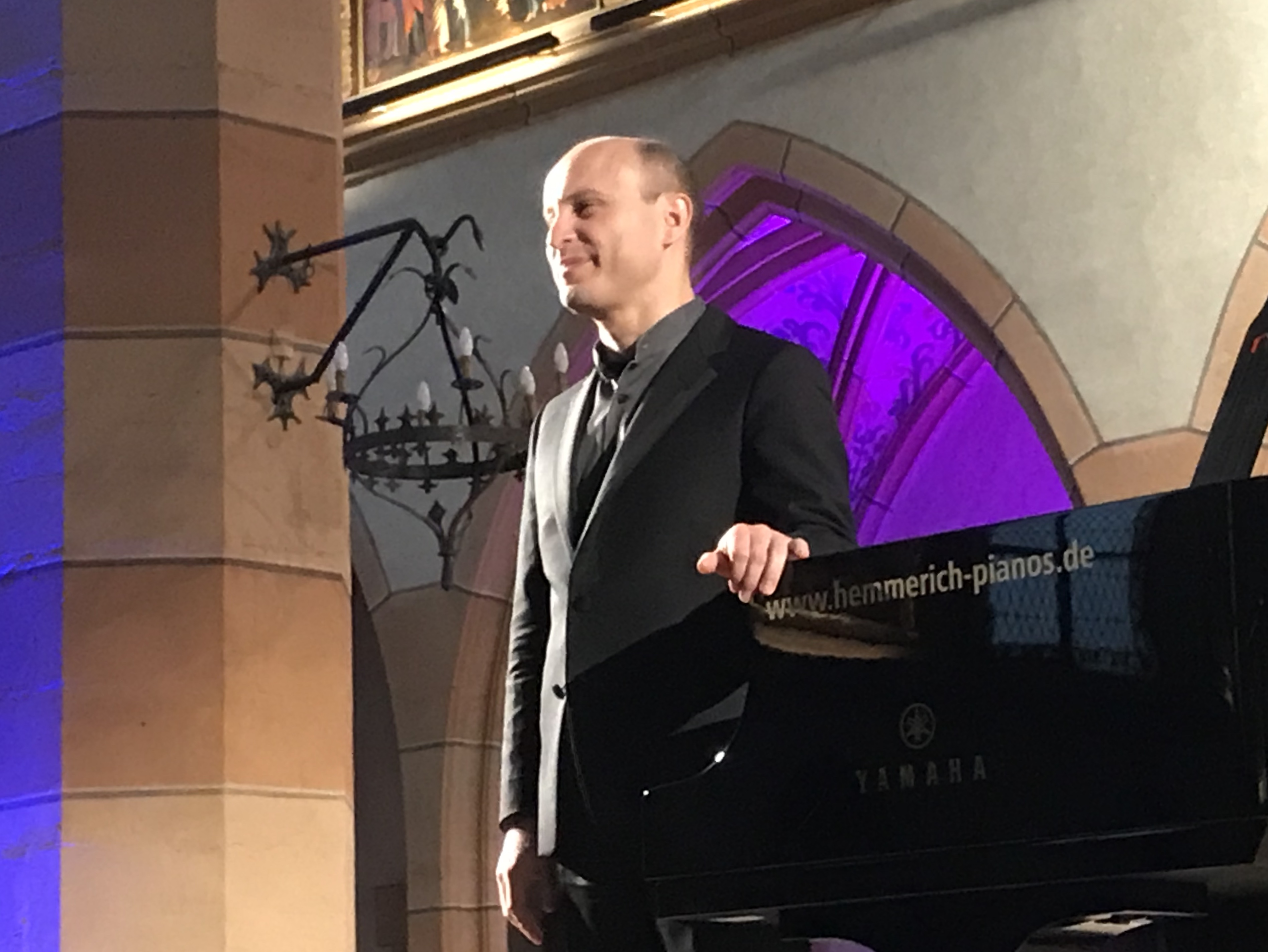 Récital du 8 mai 2019